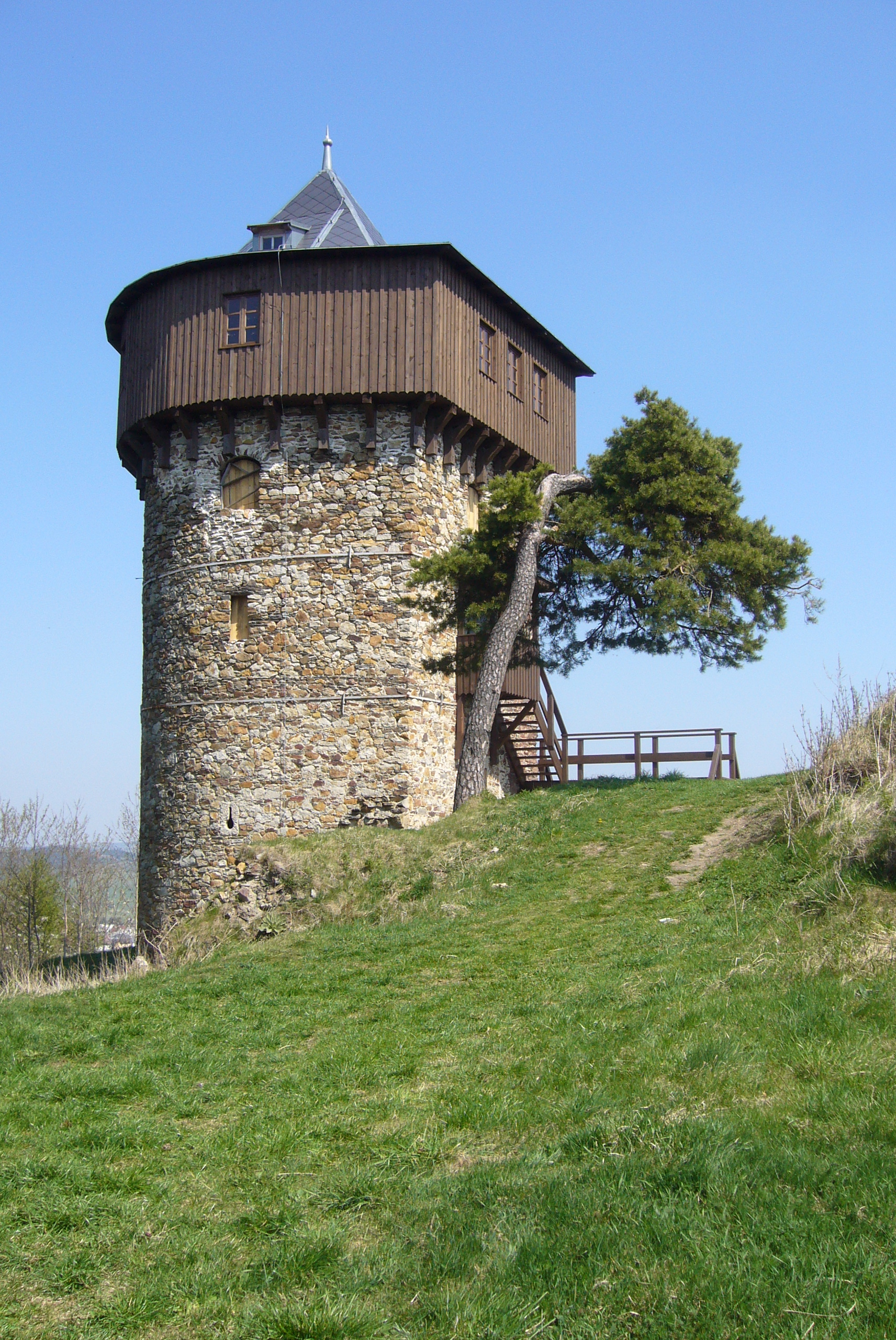 Hrad Hartenstein, zřícenina (Bochov), Bochov